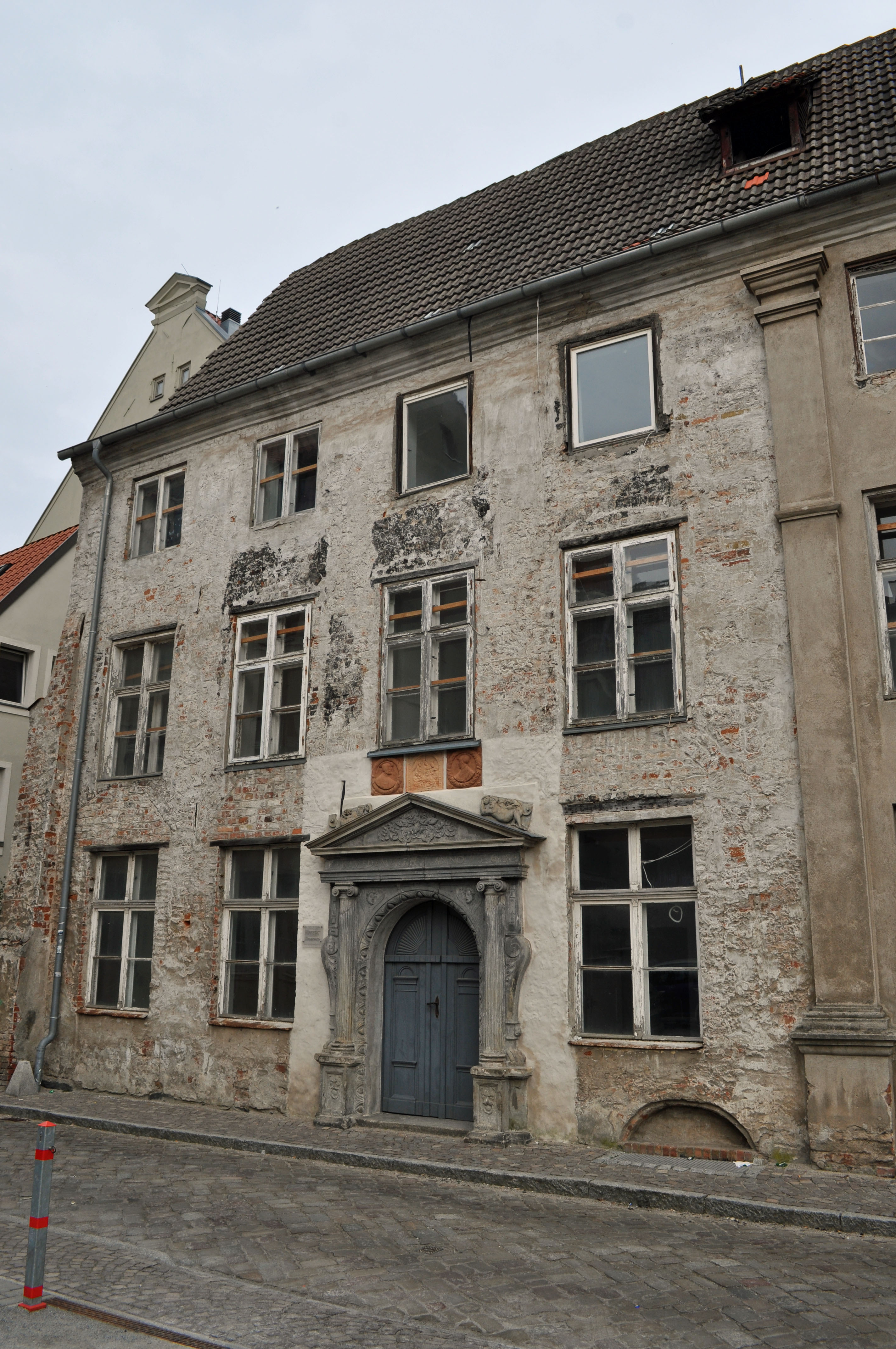 Gebäude bzw. Gebäudedetail in Stralsund. Straße und Hausnummer siehe Dateiname.